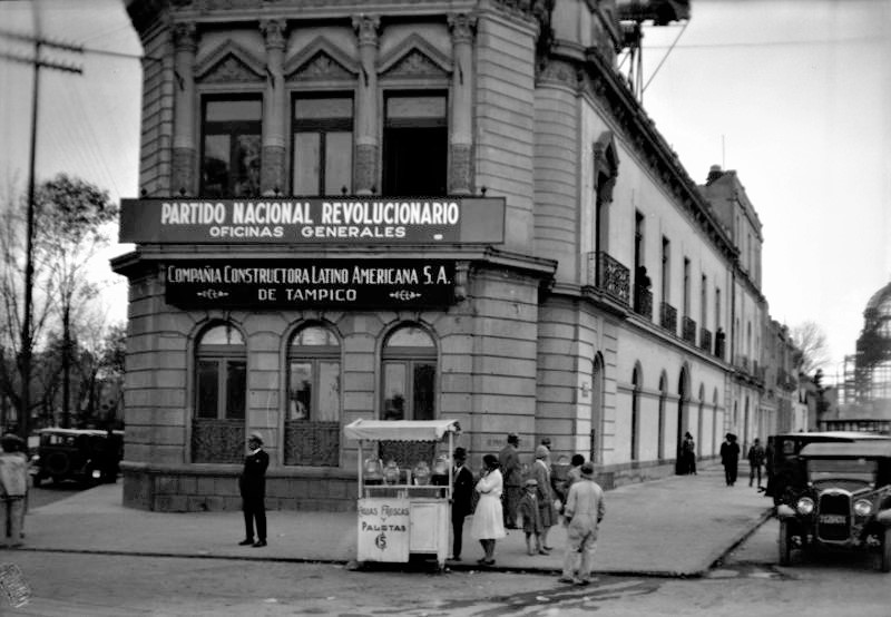 Oficinas generales del Partido Nacional Revolucionario en esquina del Paseo de la Reforma y Avenida del Palacio Legislativo número 2.